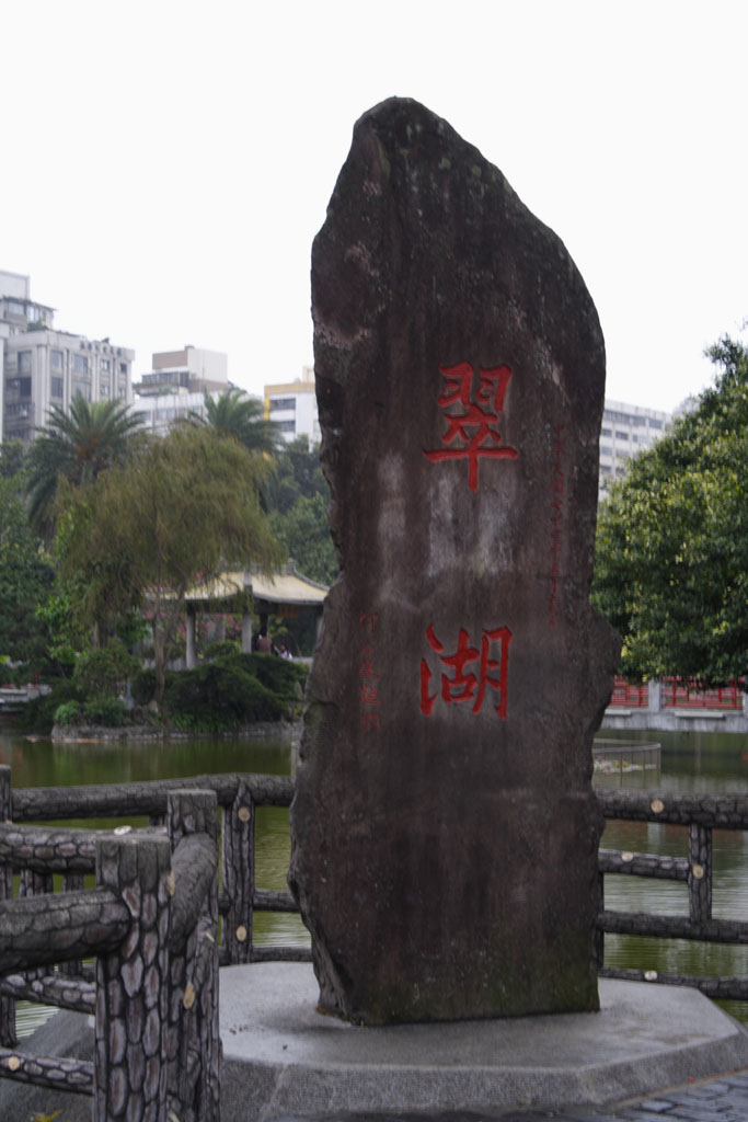 中文（台灣）: 臺北市國父紀念館翠湖石碑，何應欽題字。